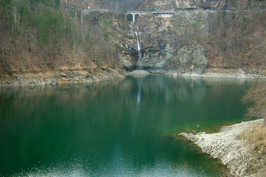 Bacino artificiale di Palagnedra (CH) lungo il torrente Melezzo (o Melezza)